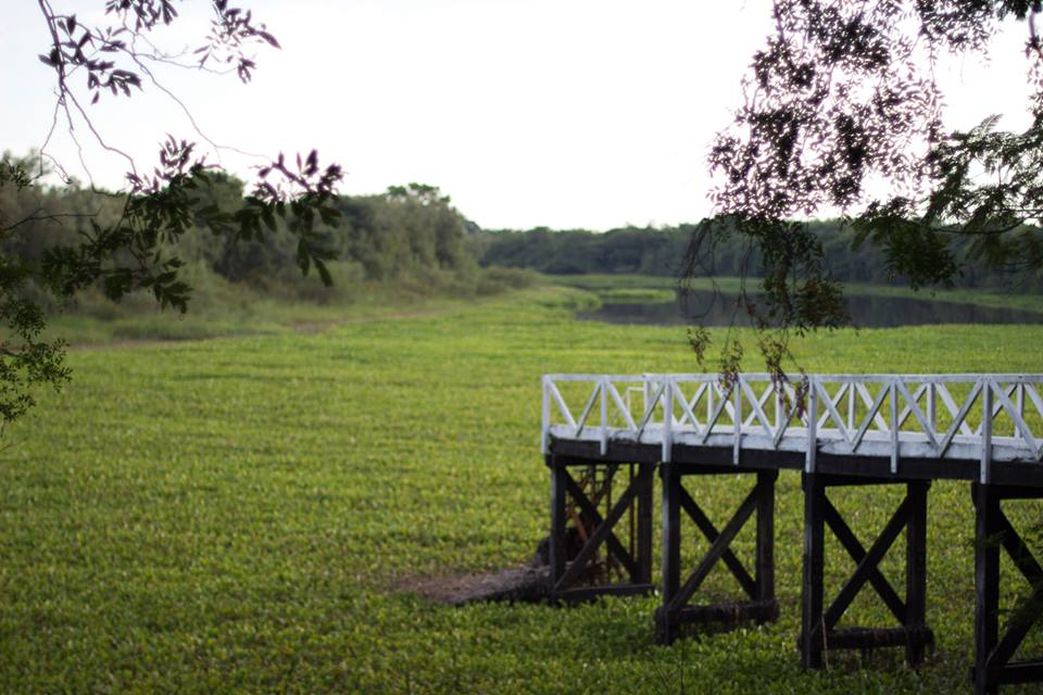 Muelle sobre laguna próxima al río Paraná, cerca de Resistencia, Chaco